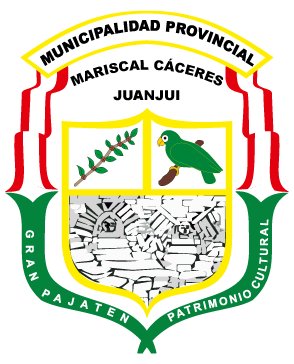 Escudo Oficial de la Municipalidad Provincial de Mariscal Cáceres - Juanjuí